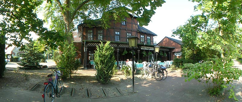 Aussenansicht Alter Bahnhof Petershagen